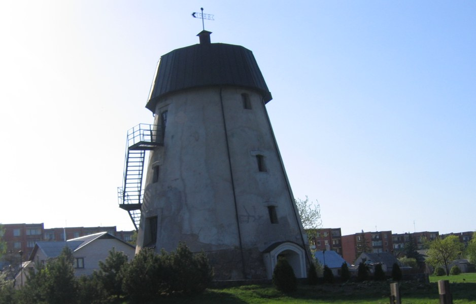 Autoriaus nuotrauka, 2006.05.08. Malūno pastatas Panevėžyje. Nuotrauka gali būti platinama pagal GFDL licenciją.